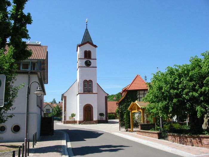 Spirkelbach Ortsmitte